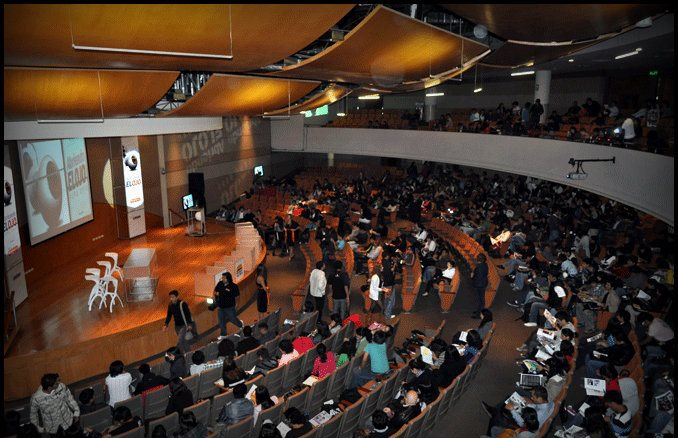 Aula Magna